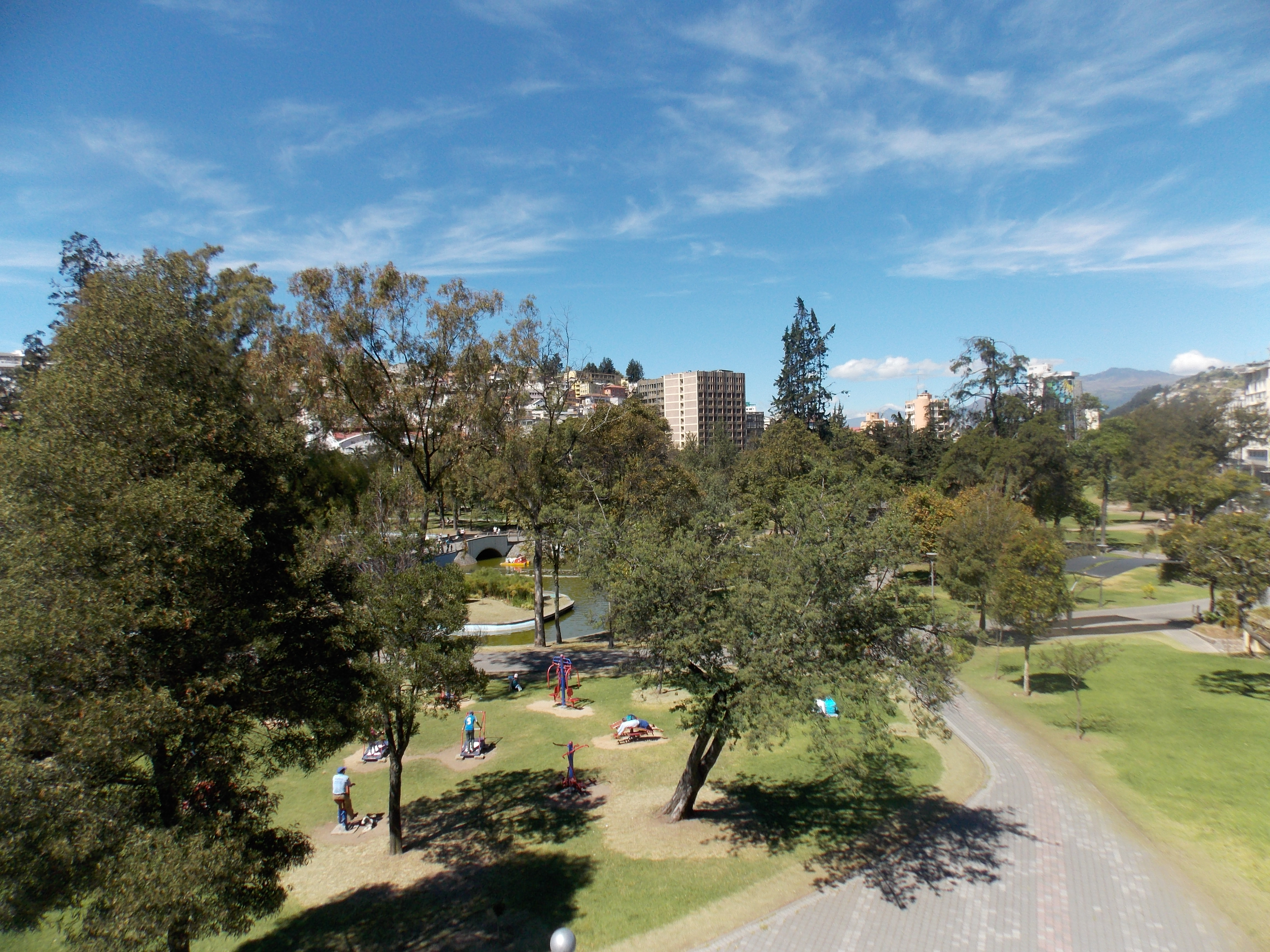 Vista panorámica del parque La Alameda (Quito, Ecuador), desde la esquina noroccidental.